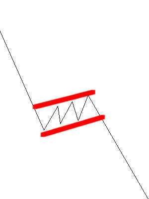 Ein Bild eines Beispielcharts einer bearishen Flagge